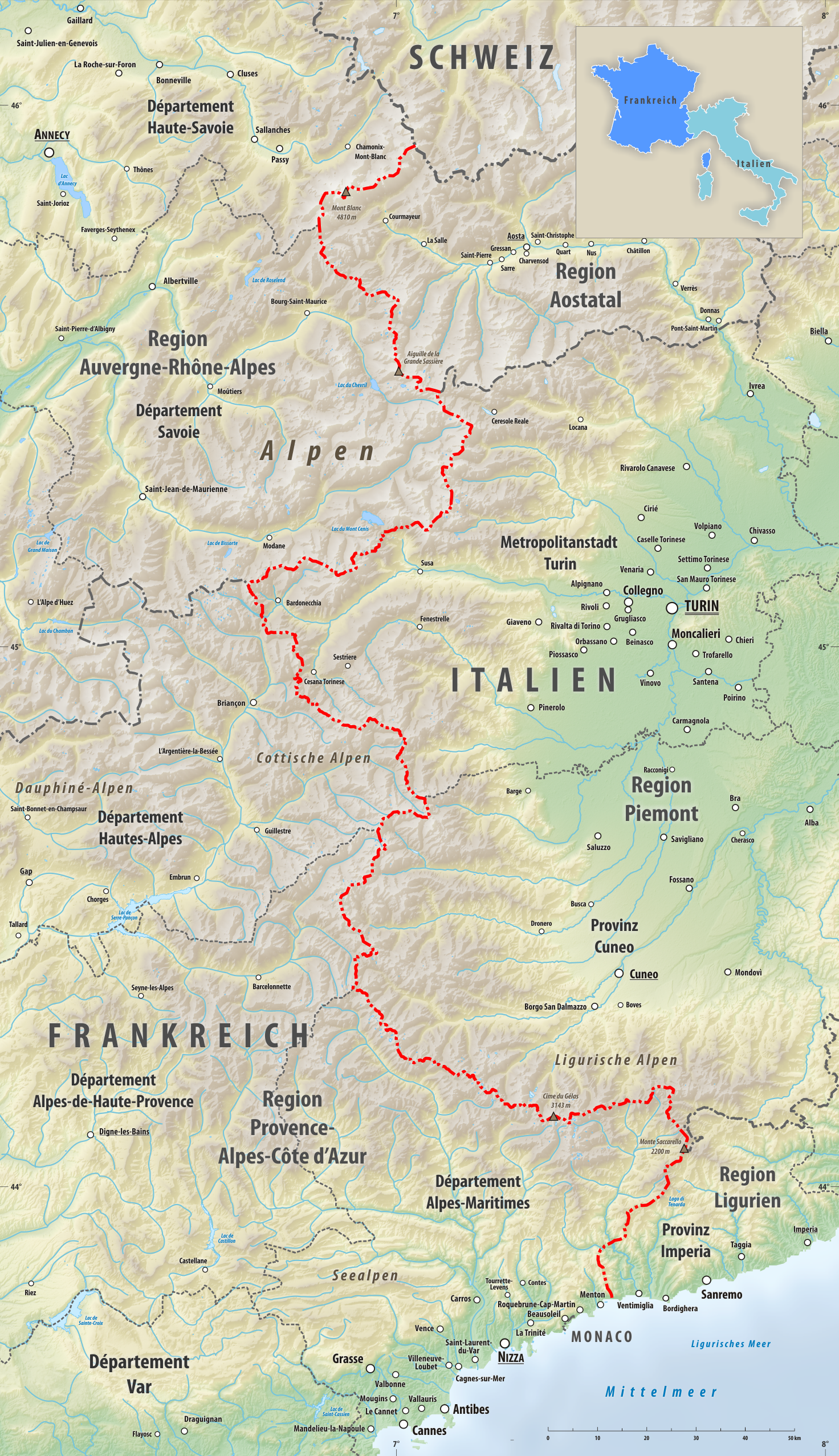 Reliefkarte des Grenzverlaufes zwischen Frankreich und Italien Topographischer Hintergrund: NASA Shuttle Radar Topography Mission (public domain). SRTM3 v.2.